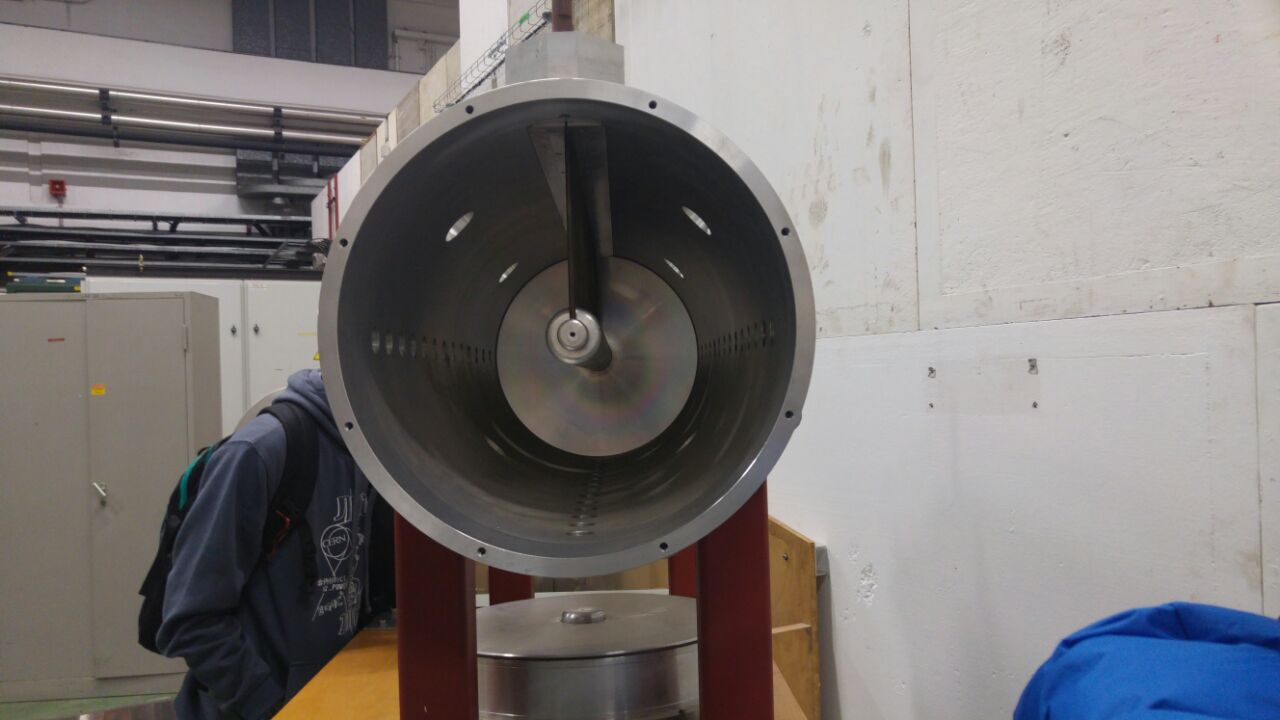 תא גלילי במאיץ הלינארי אשר דרכו עוברים הפרוטונים